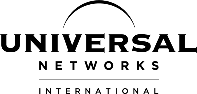 Logo von Universal Networks International 2011